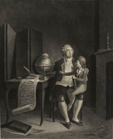 Louis XVI s'occupant de l'éducation de son fils dans la Tour du Temple. Musée de la révolution française - Vizille